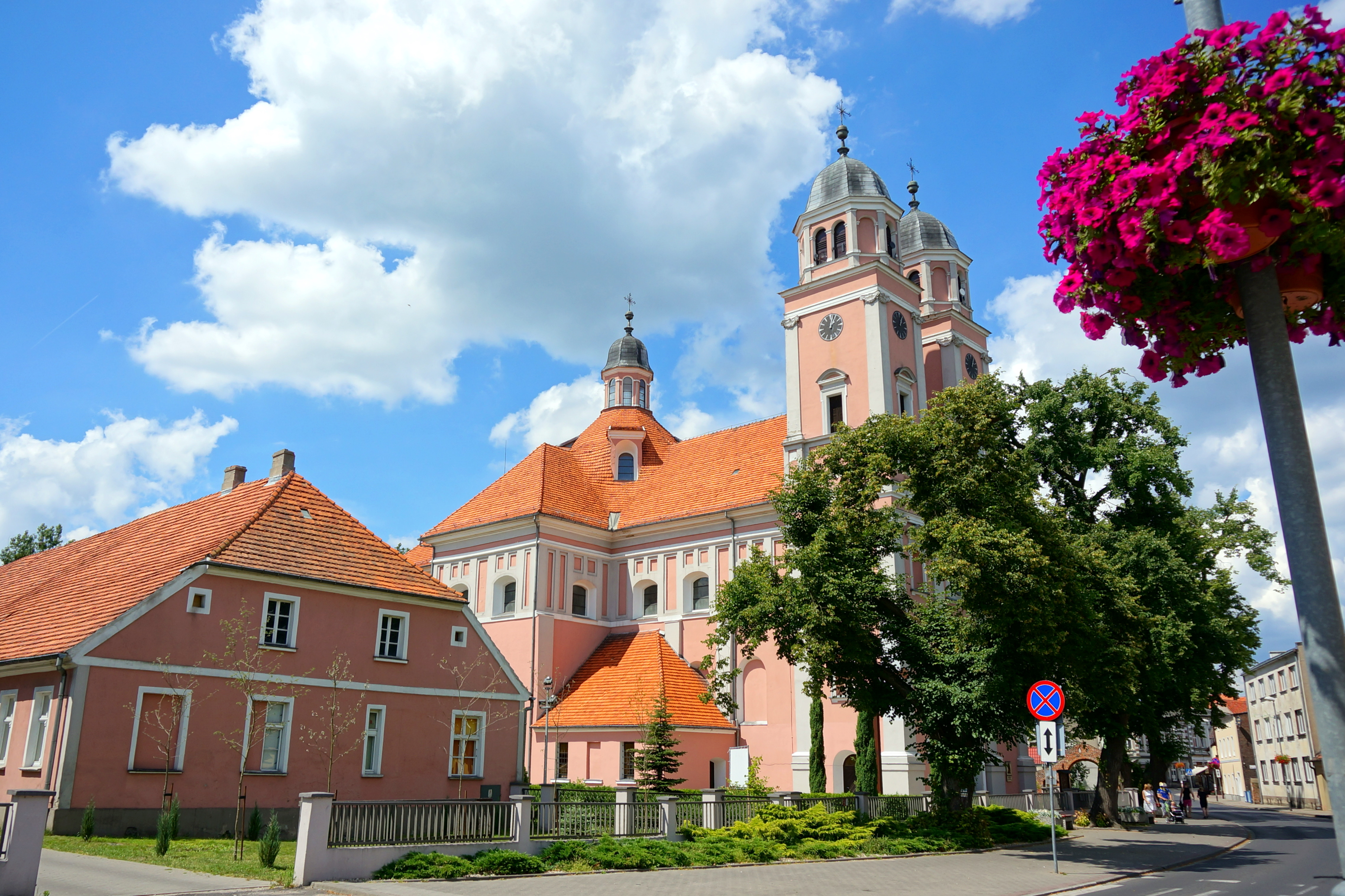 Sieraków, zespół klasztorny bernardynów, XVII, XIX